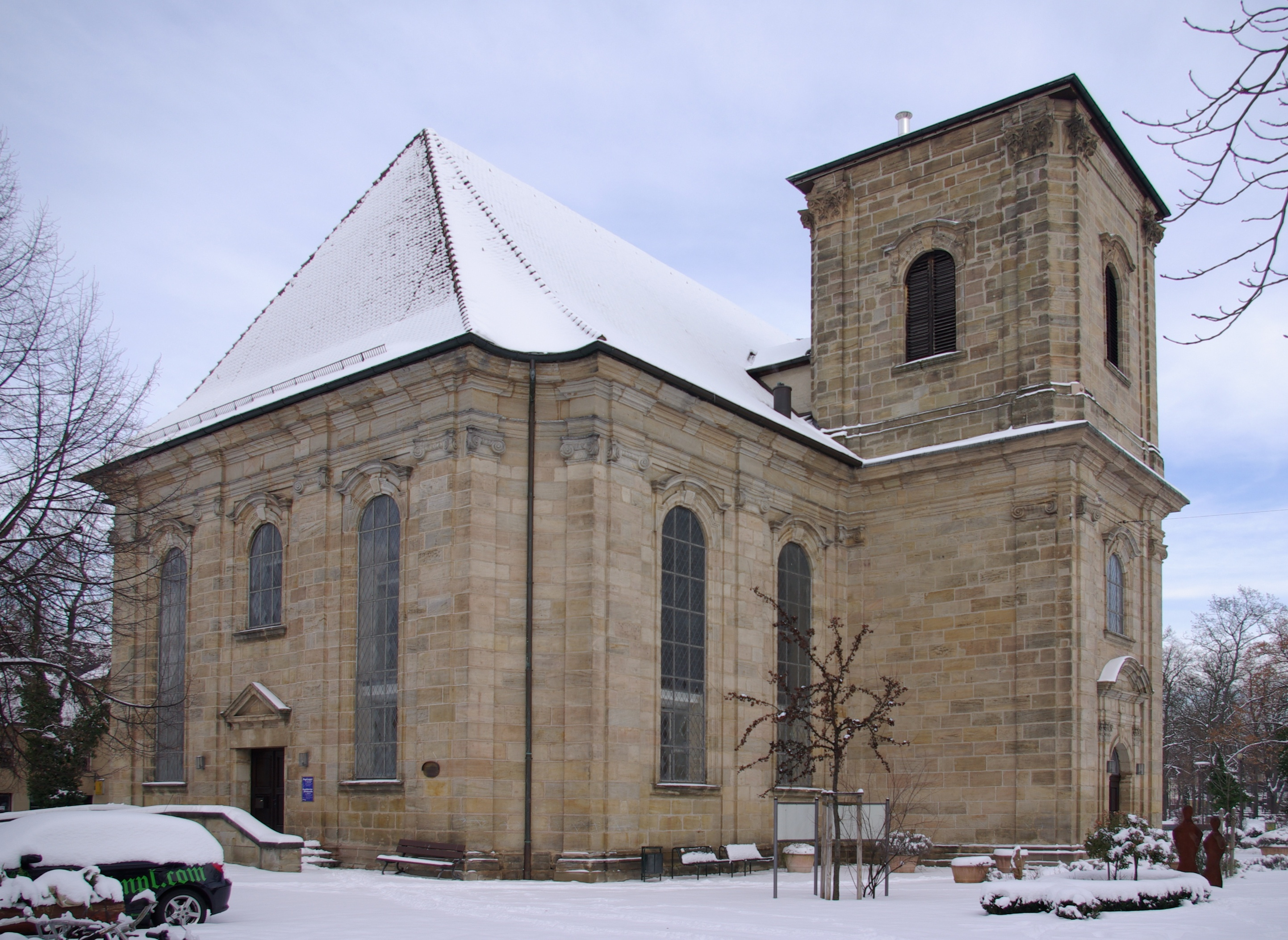 Gemeindehaus am Bohlenplatz in Erlangen. Die von 1728 bis 1734 erbaute, ehemalige Deutsch-reformierte Kirche am heutigen Bohlenplatz 1 galt als elegantester Sakralbau Erlangens. 1922 wurde das Gebäude von der Evangelisch-lutherischen Kirchengemeinde gekauft und in Christuskirche umbenannt. 1953 wurde das Kirchengebäude in ein Gemeindehaus umgebaut, wobei durch den Einbau einer Zwischendecke der ursprüngliche Innenraum zerstört wurde. Die Orgel fand in der 1954 bis 1955 erbauten Markuskirche im Erlanger Stadtdteil Sieglitzhof einen neuen Standort.